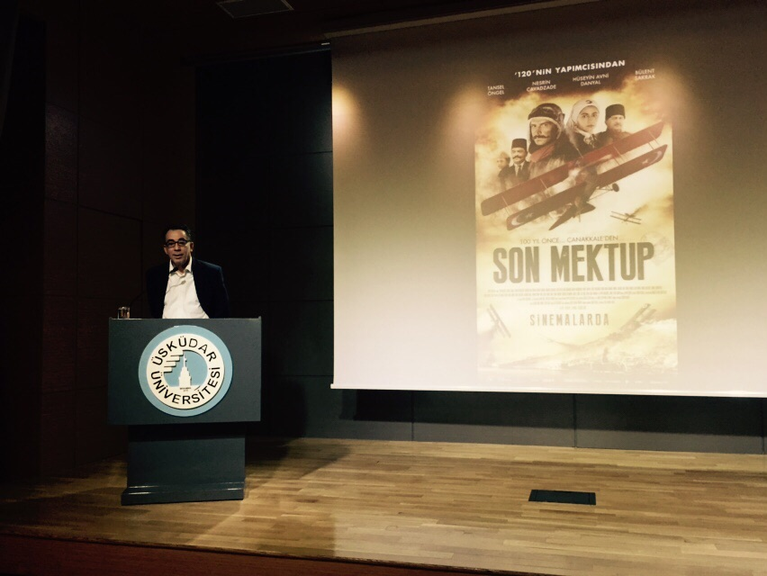 120 ve 18 Mart filmleri yönetmeni Özhan Eren Üsküdar Üniversitesinde kültür derslerine katıldı.